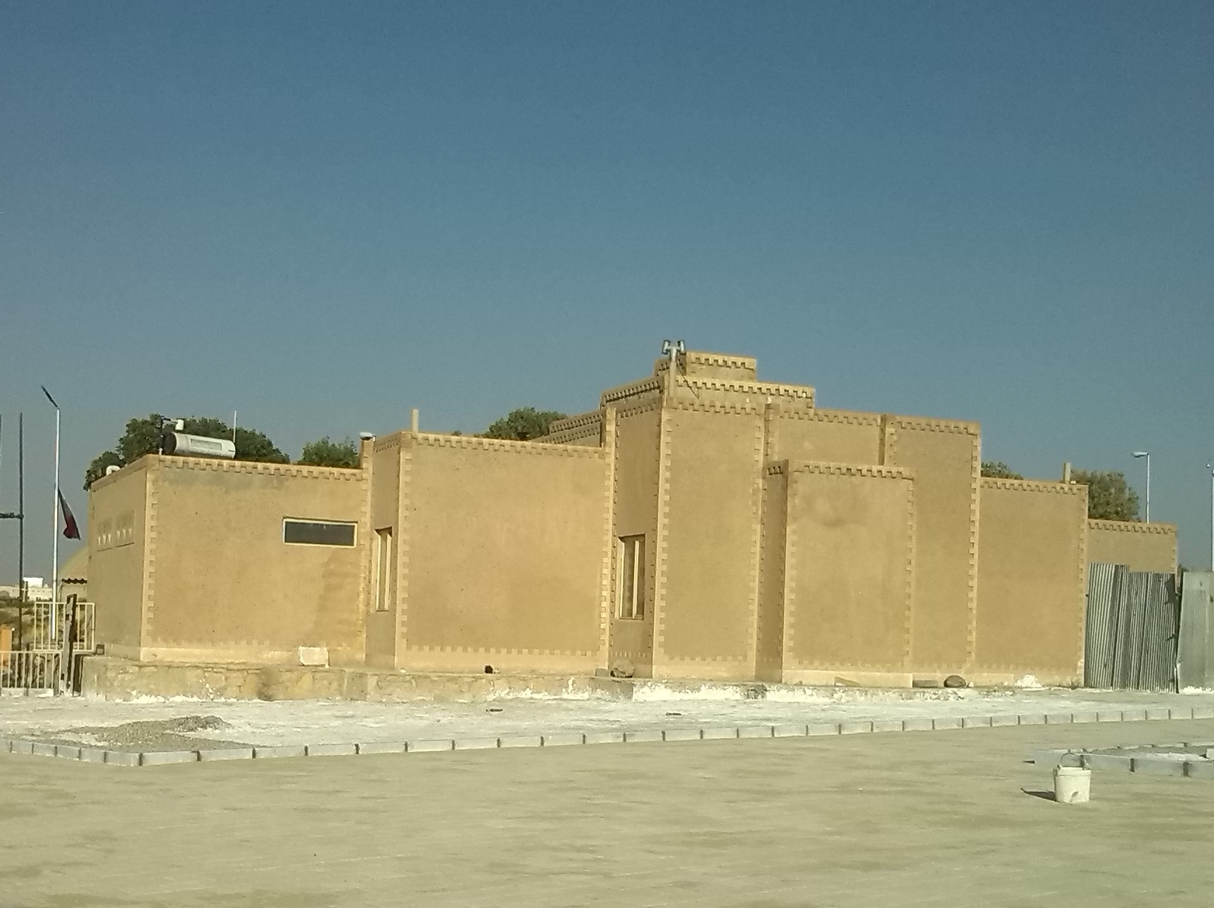 عمارت موزه جدید در محوطه تپه اکباتان واقع در شهر همدان. این بنا به سبک یا تقلید از دژ باستانی کیشه‌سو که ادعا شده در شهر باستانی اکباتان قرار داشت، ساخته شده